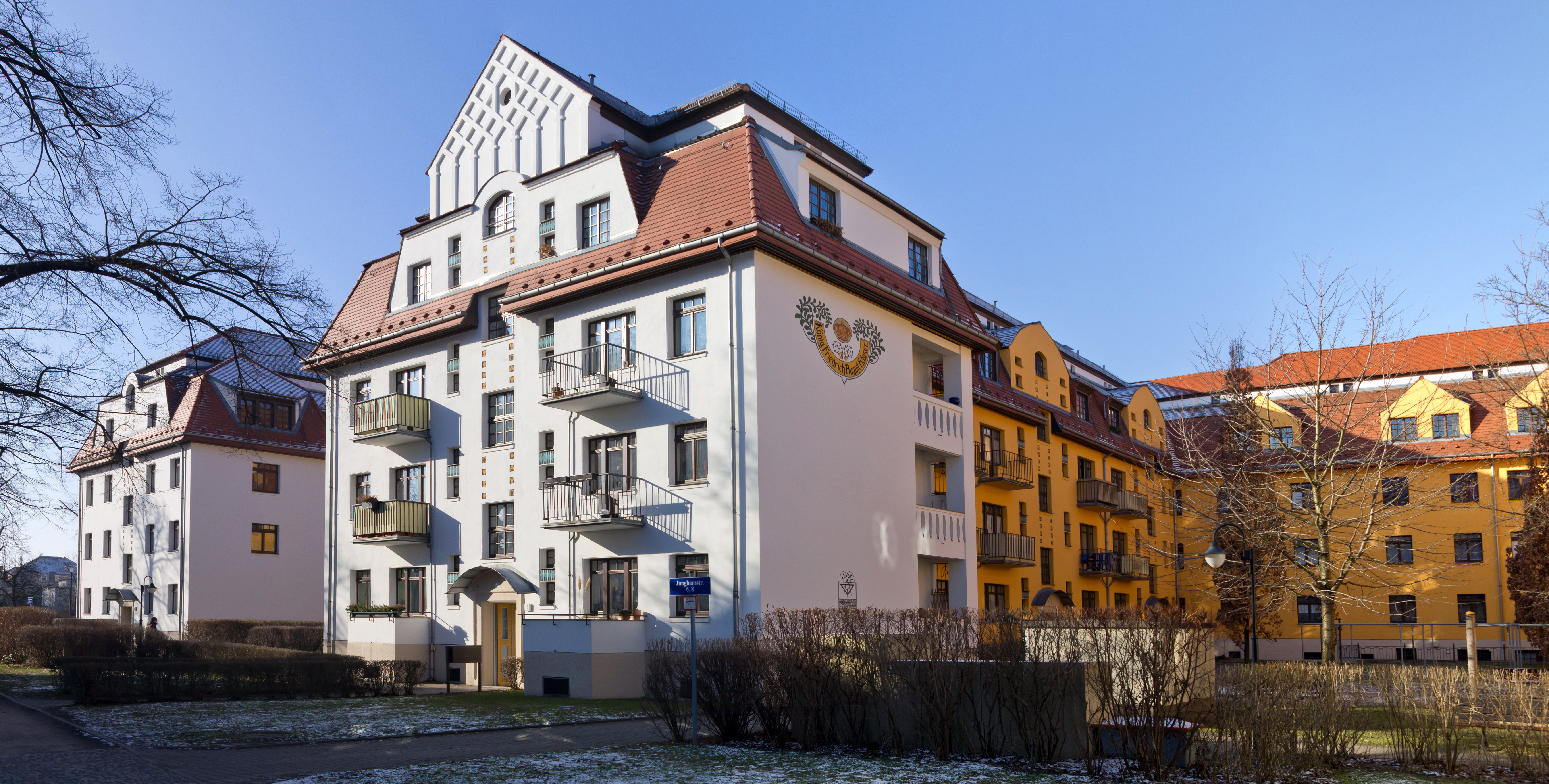 König-Friedrich-August-Häuser in Dresden. Mittlerer Block in der Junghansstraße.